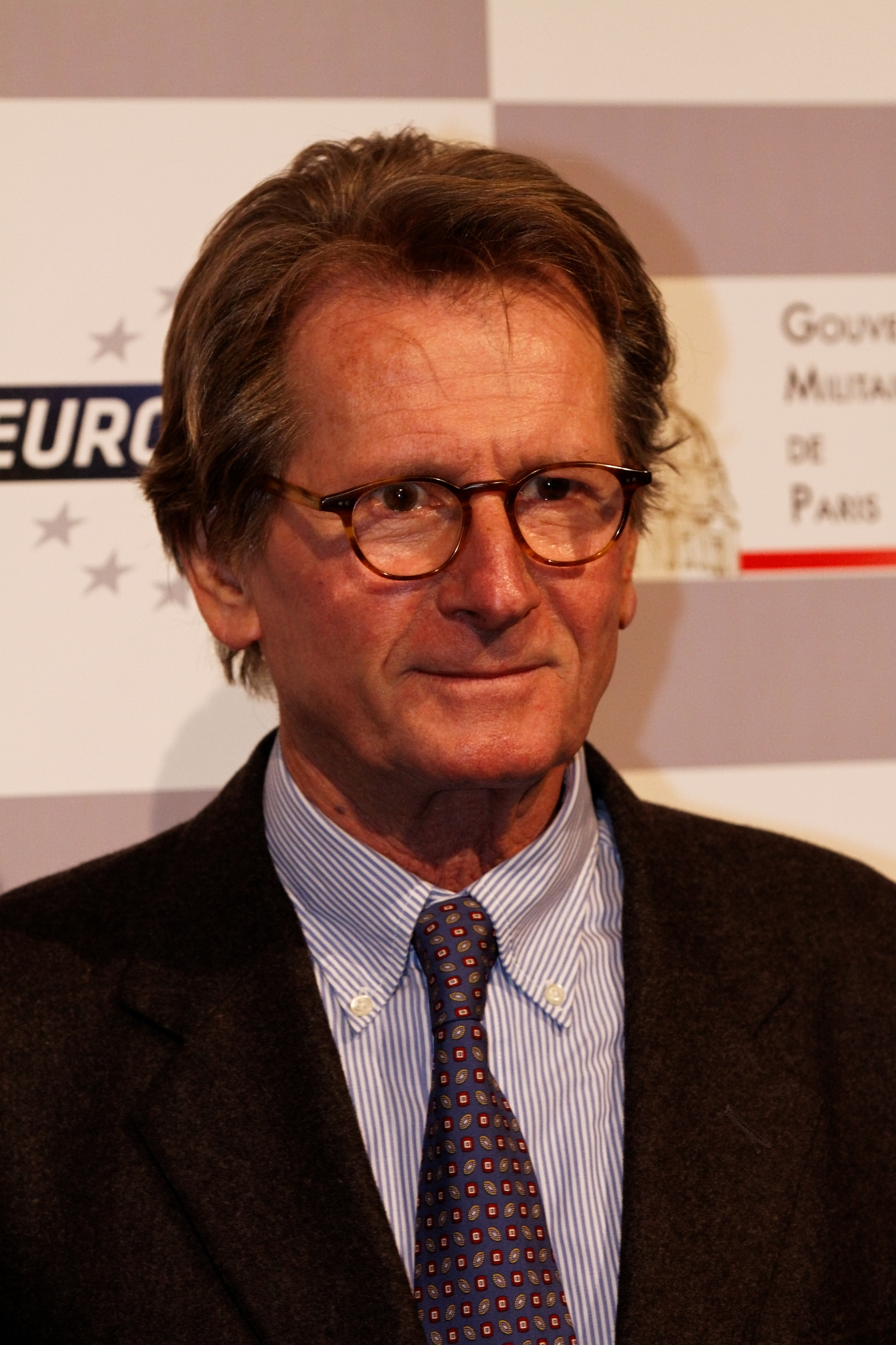 Jean-Pierre Jabouille posant lors du photocall.